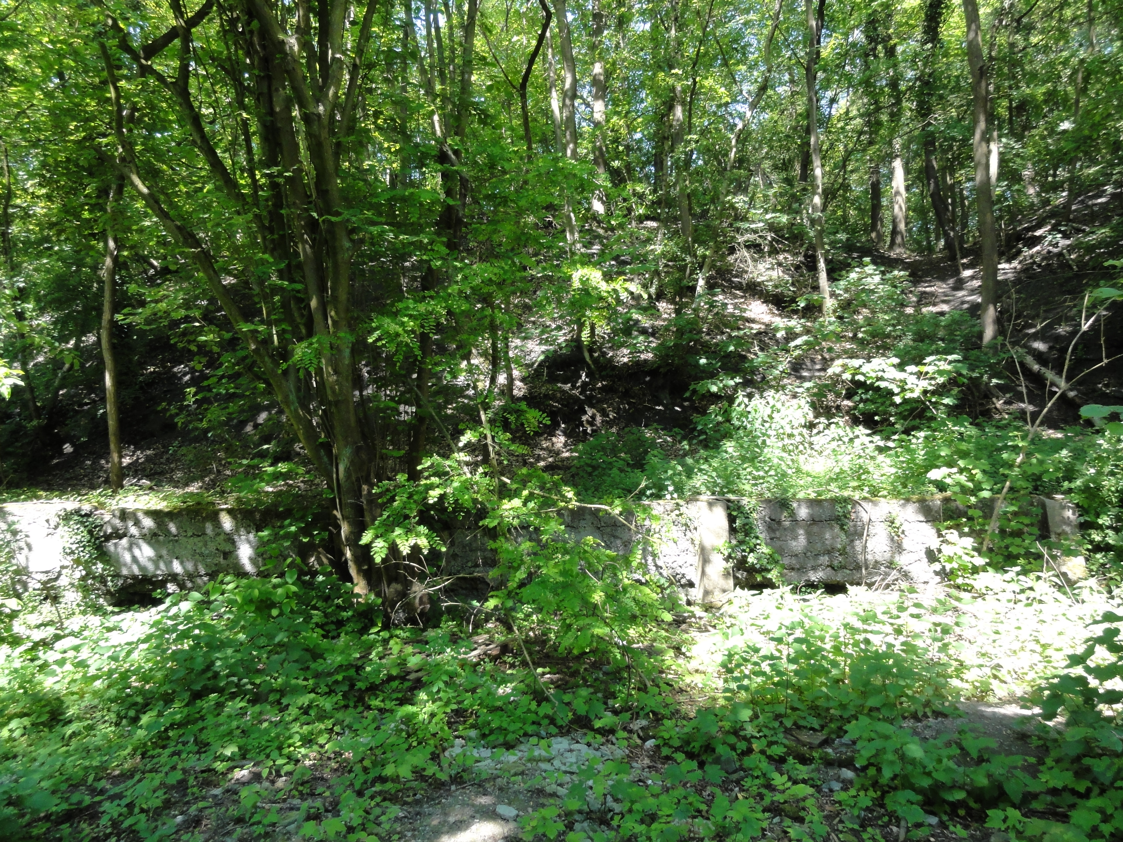 Terril n° 192 dit Saint Léonard, Fosse Saint Léonard de la Compagnie des mines d'Anzin, Vieux-Condé, Nord, Nord-Pas-de-Calais, France.